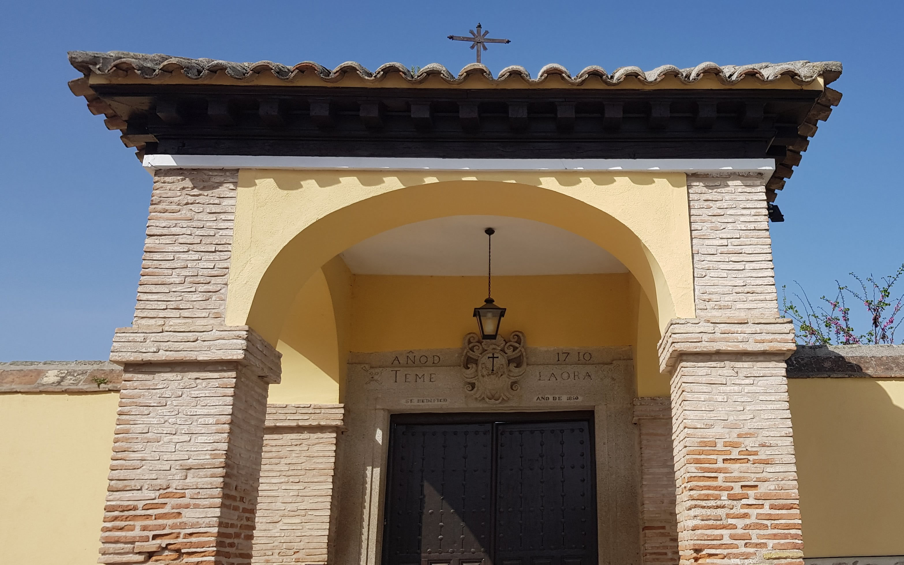 Centro Cultural San Ildefonso, Toledo, ubicado en un edificio eregido sobre el antiguo Cementerio del Hospital de la Misericordia tambien llamado Cementerio de la Beneficencia